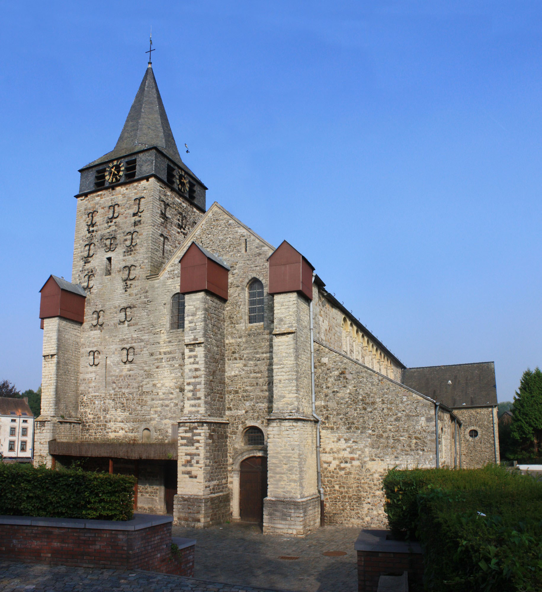 De kerk van Saints-Martin-et-Adèle in Orp-Jouche